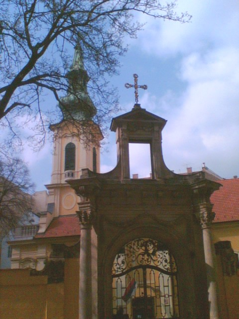 Pesti szerb templom Budapest, Hungary